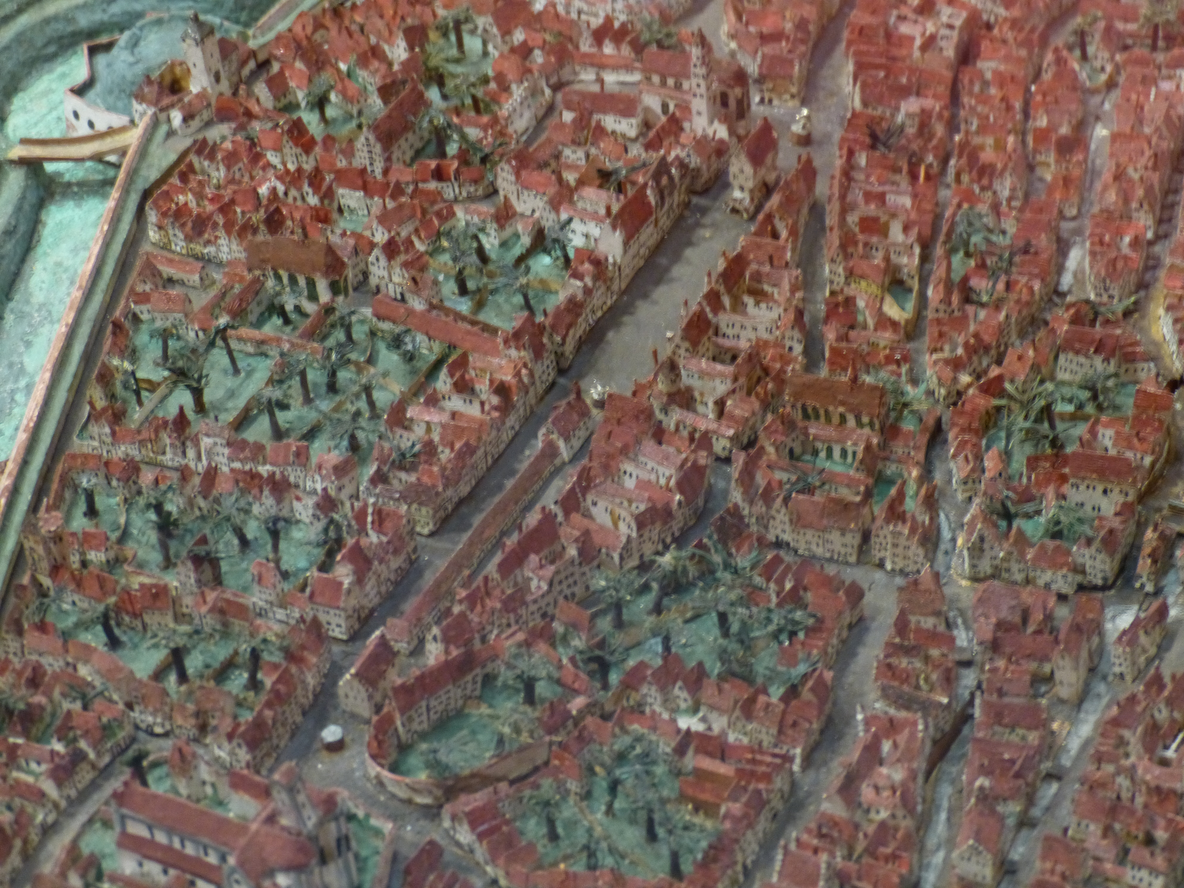 Augsburg, Maximilianmuseum